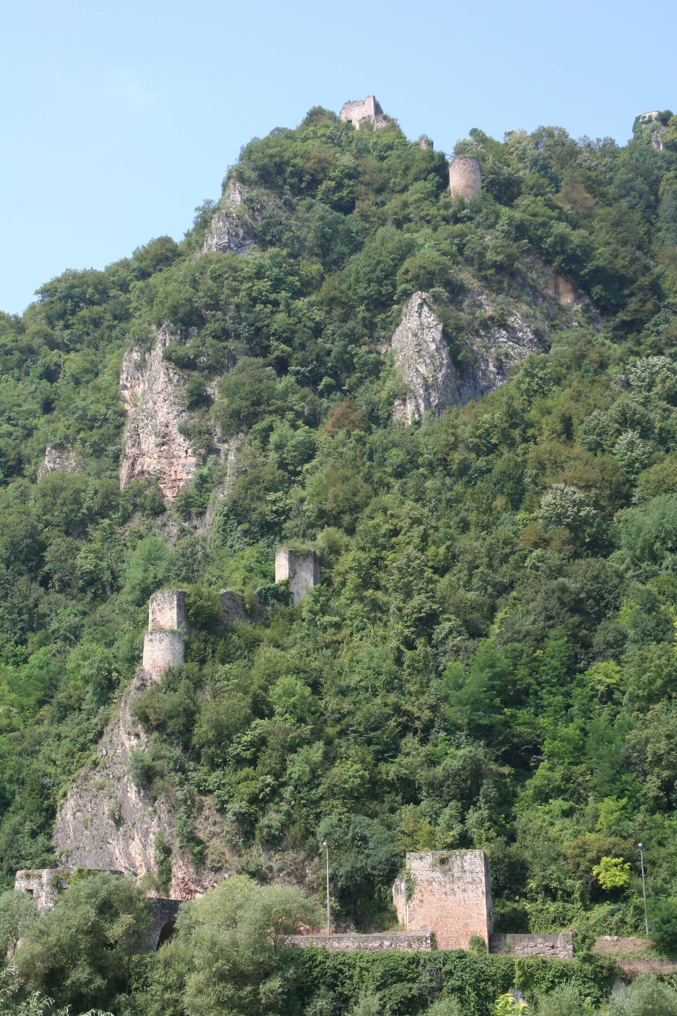 Pogled na utvrđenje u Zvorniku, Mali Zvornik